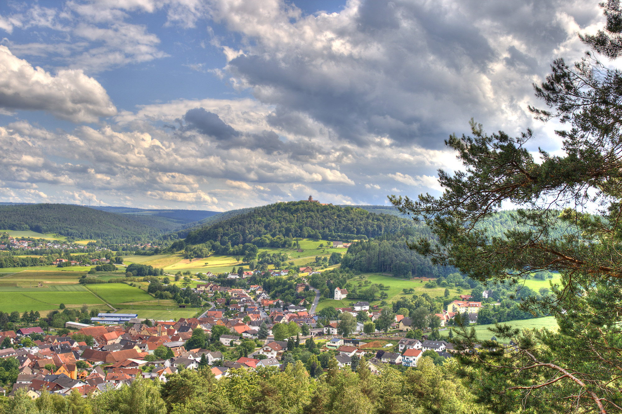 Blick auf Hainstadt und die Burg vom Steinbruch aus.